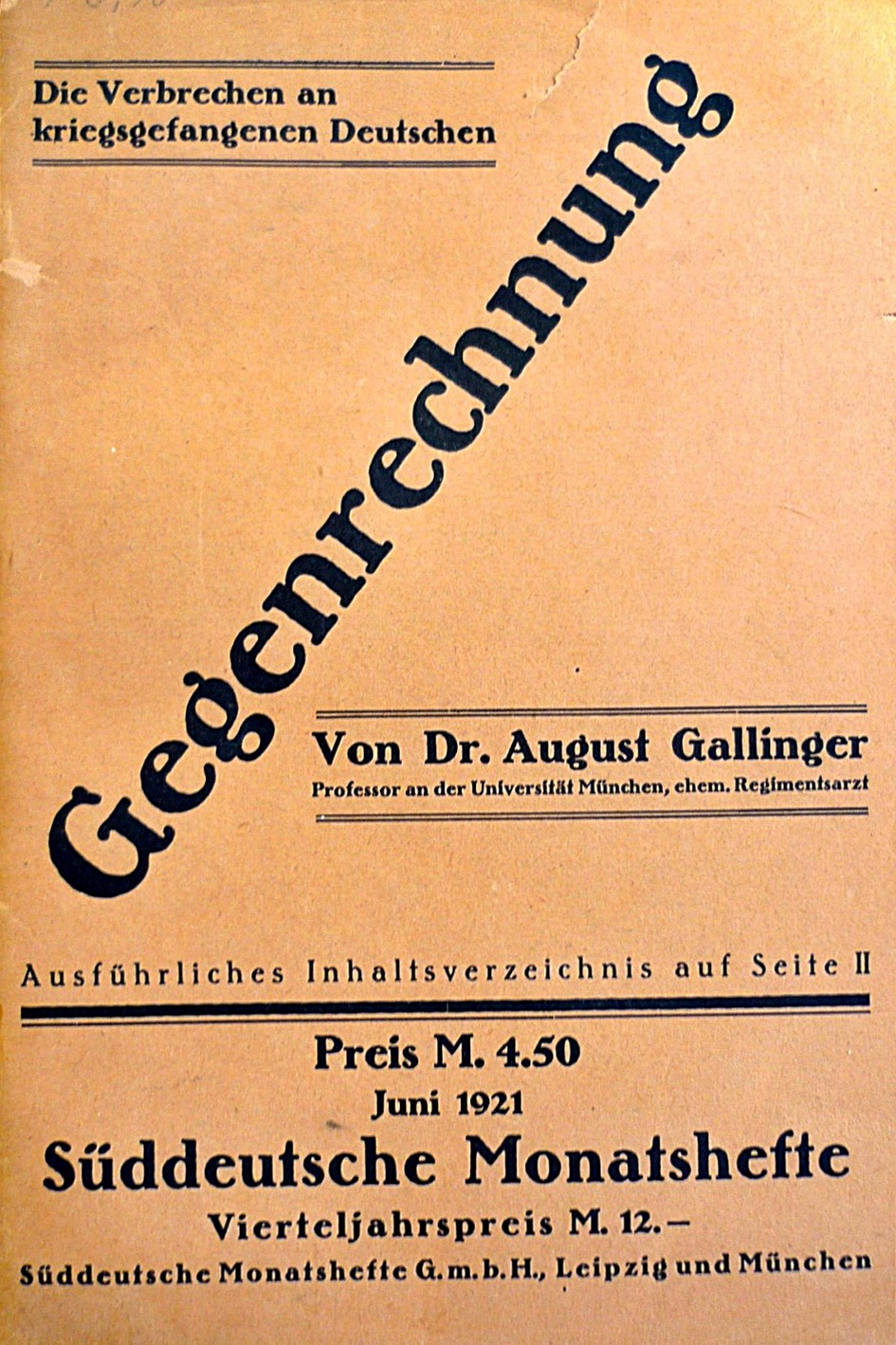 Süddeutsche Monatshefte, 1921, Herausgeber Paul Nikolaus Cossmann (+ 1942). Verfasser des Buchinhalts: August Gallinger, bayerischer Militär-Oberarzt